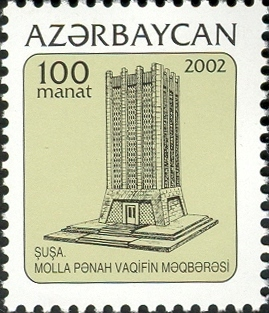 Markanın üzərində Molla Pənah Vaqifin Şuşada yerləşən mavzoleyi təsvir olunmuşdur.